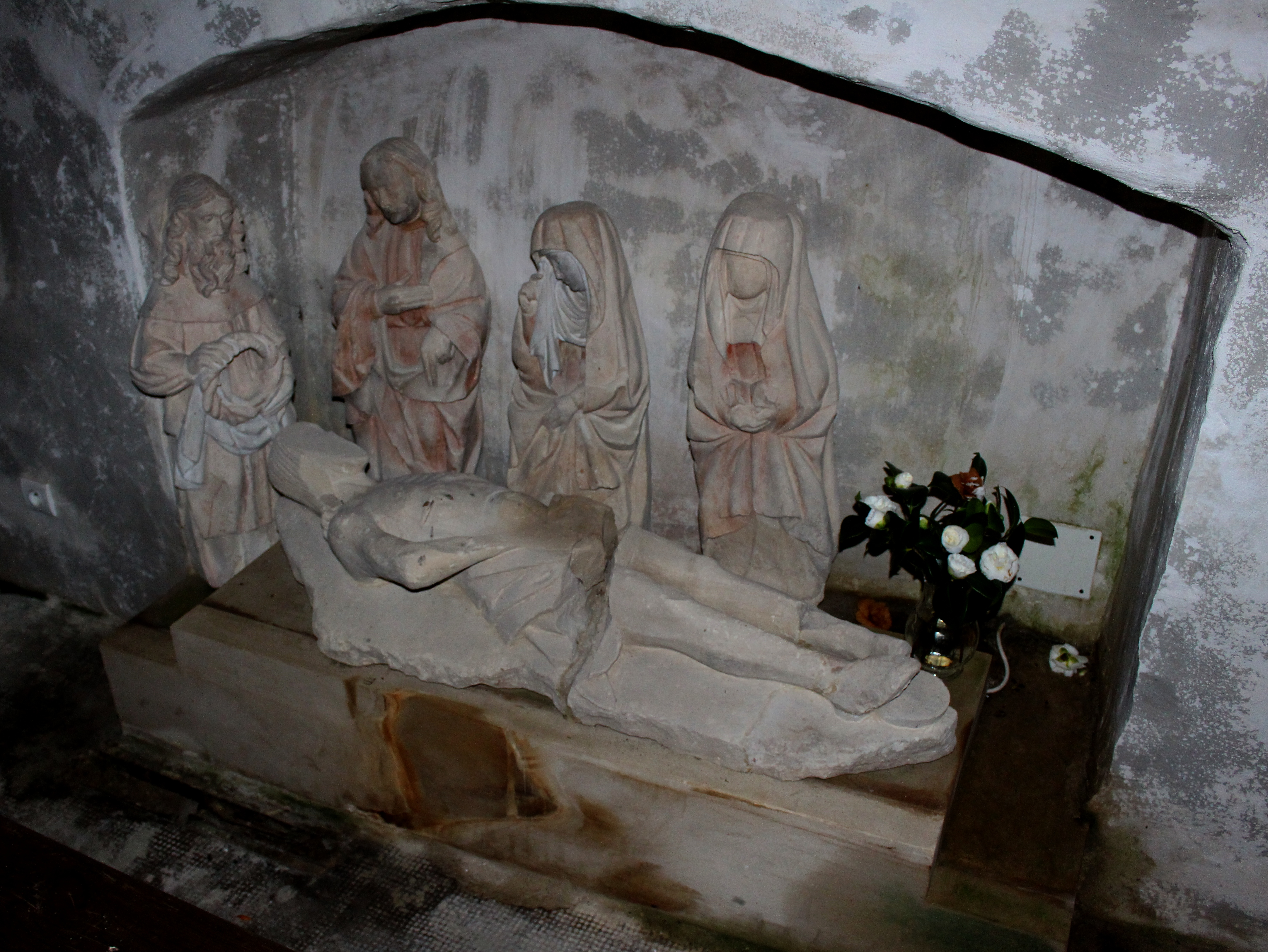 Gréville-Hague, Manche